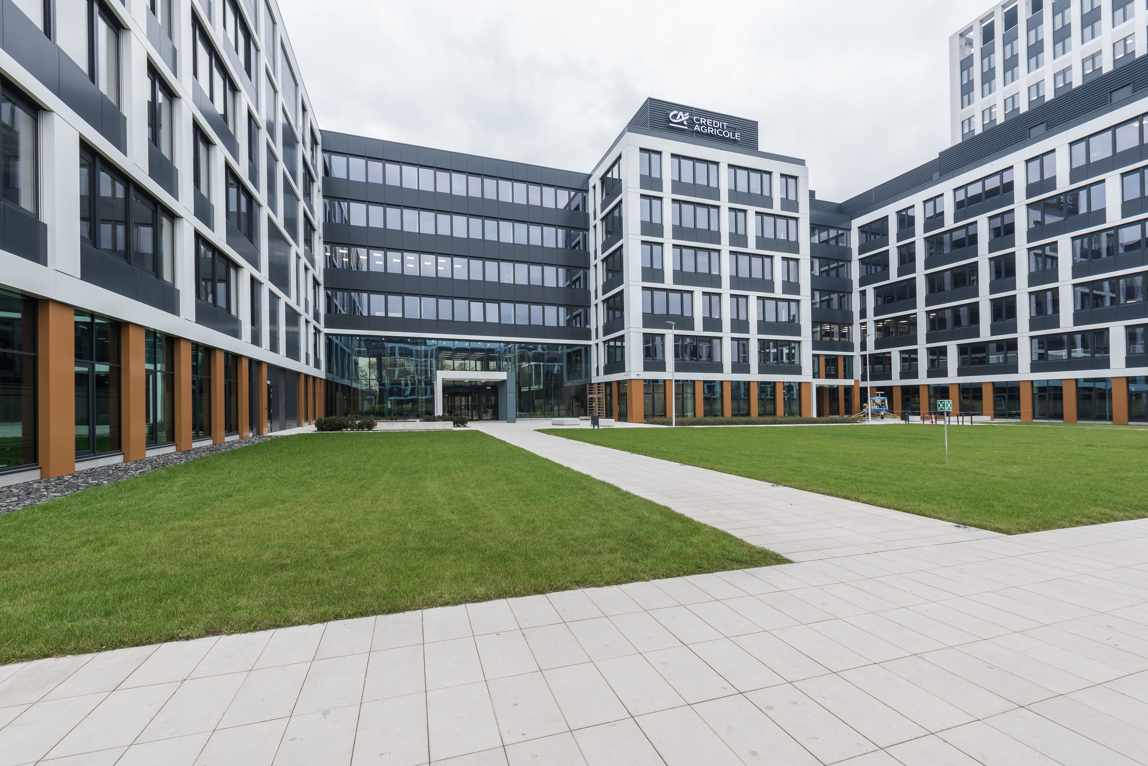 Siedziba Credit Agricole Bank Polska S.A.